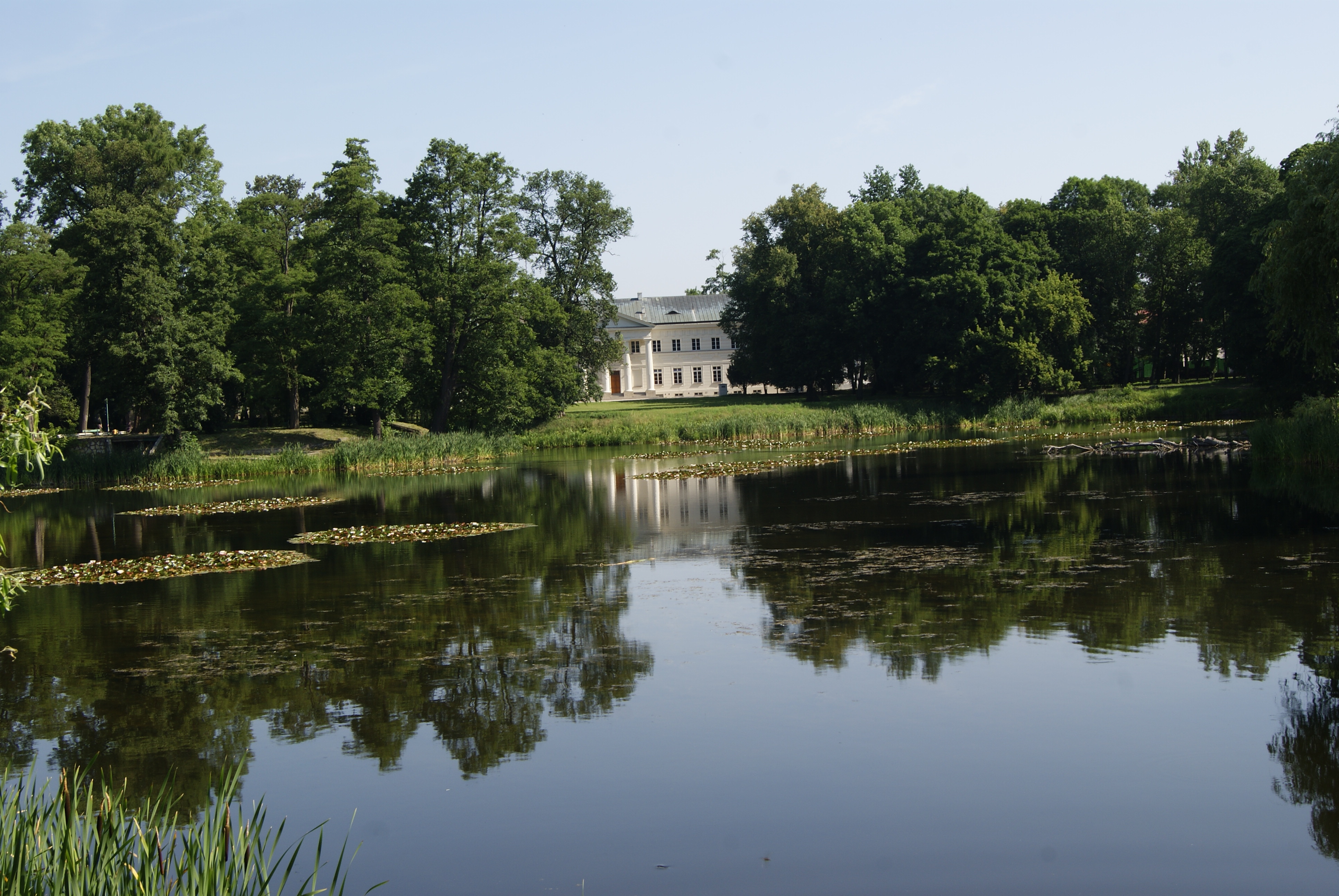 zespół pałacowy Dęblin